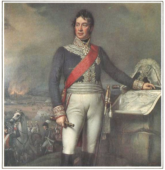 Feldmarschall Carl Philipp von Wrede, gemalt von Joseph Karl Stieler